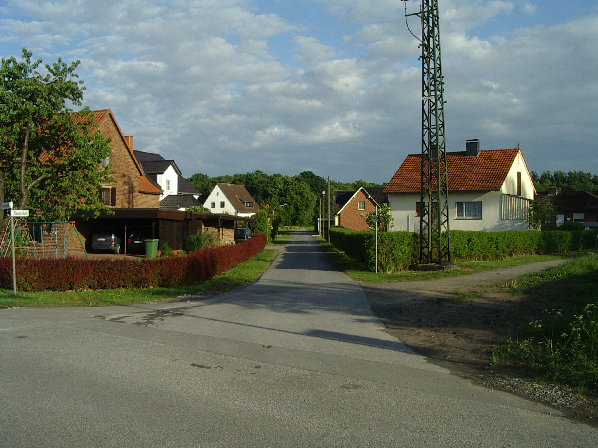 Kreuzung in Dorfwelver